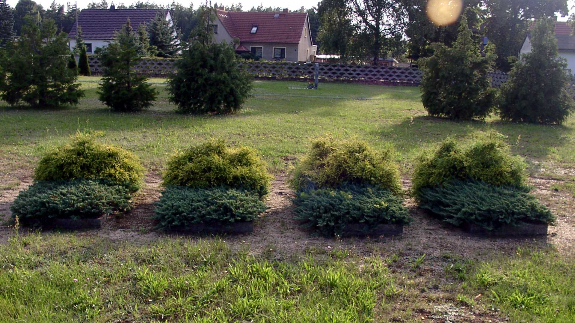 Judengraeber auf dem Friedhof in Schilda (Cemetary of Schilda)